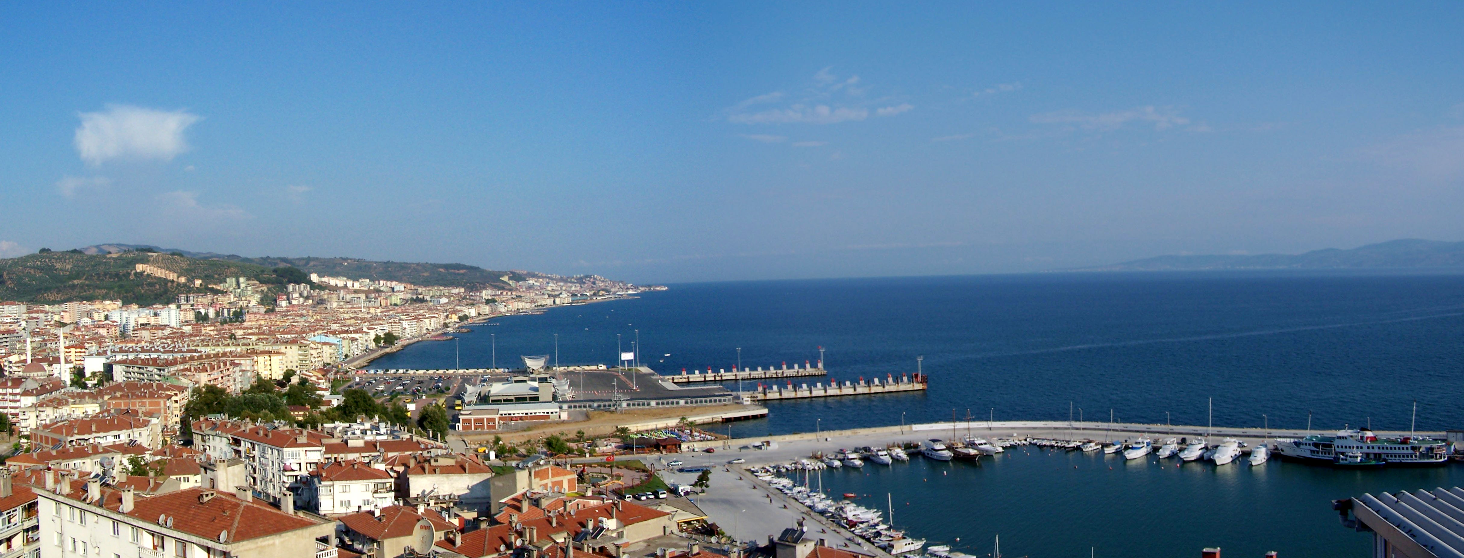 Panoramic view of Güzelyalı and Mudanya, Turkey